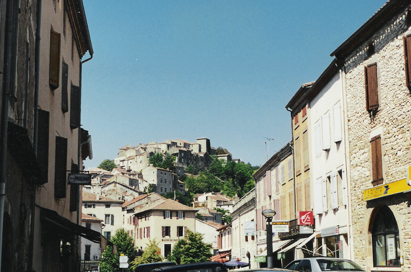 La cité médiévale de Cordes-sur-Ciel (France, Tarn) vue des pieds du village.